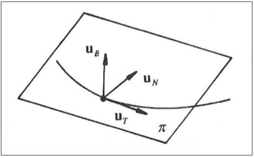 Ibilbidearen arabera definituriko Freneten koordenatu sistema intrintsekoaren irudi grafikoa.